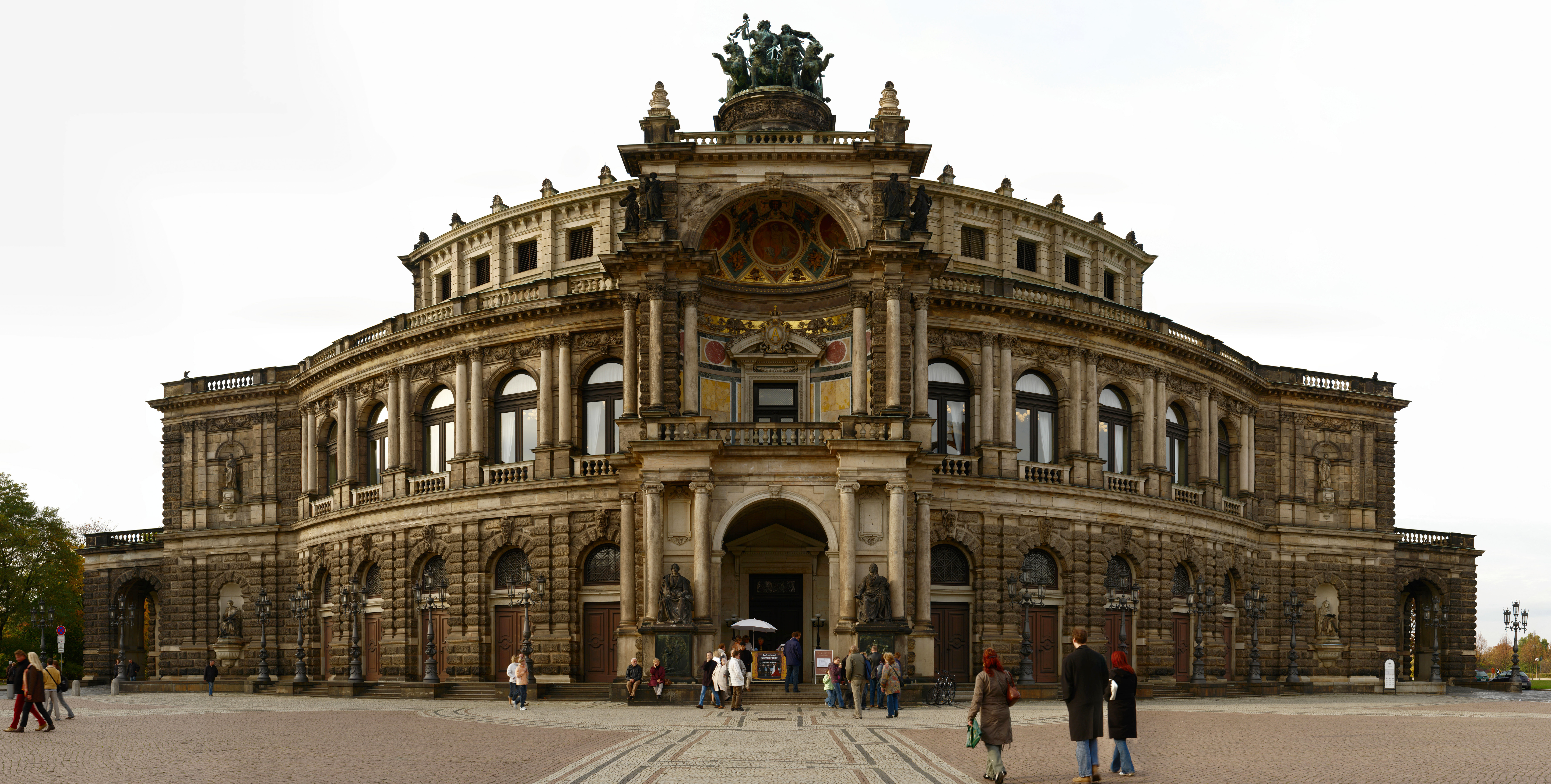 Semperoper Dresden, Germany